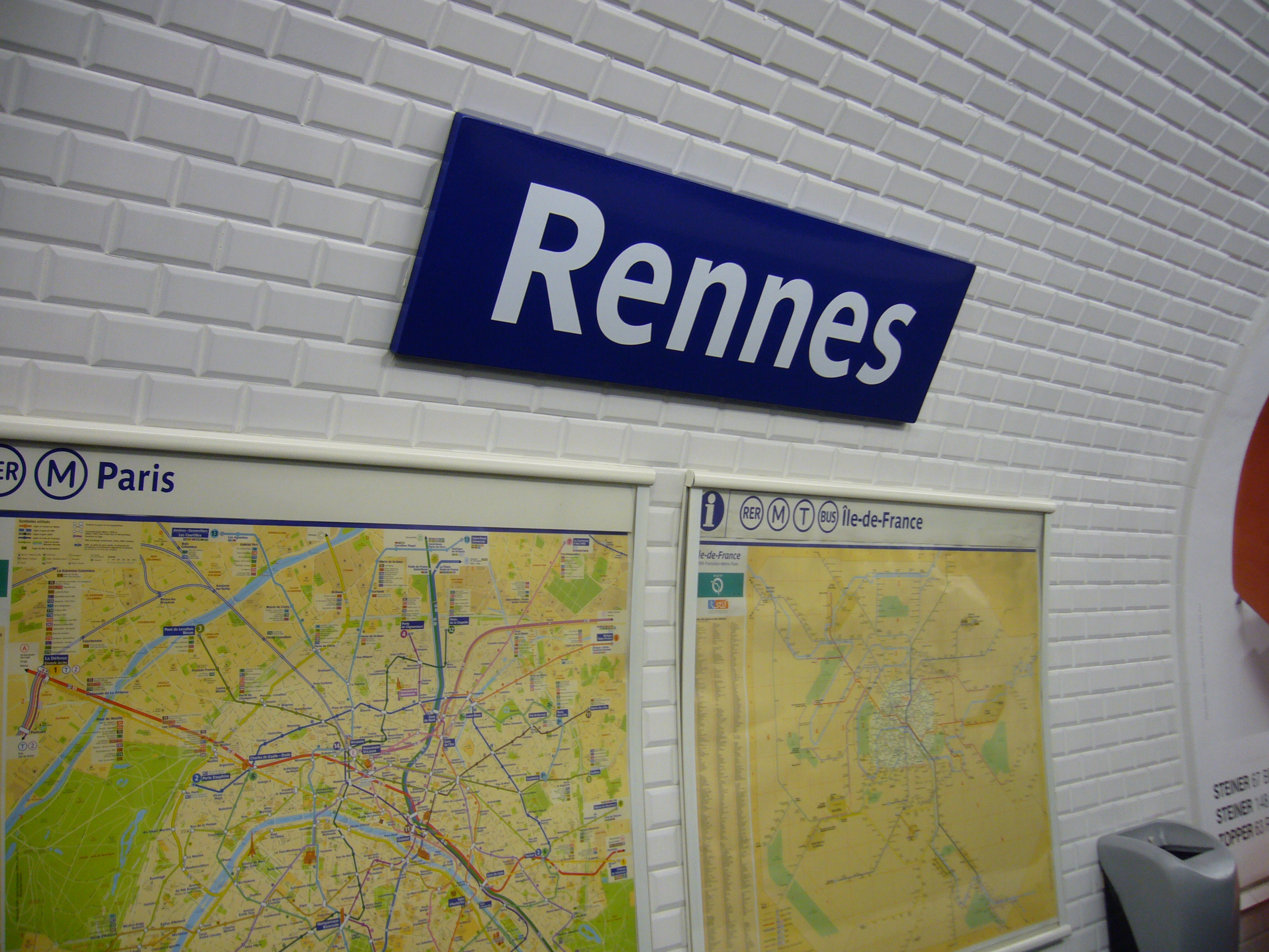 Vue du nom de la station Rennes sur la ligne 12 du métro de Paris.